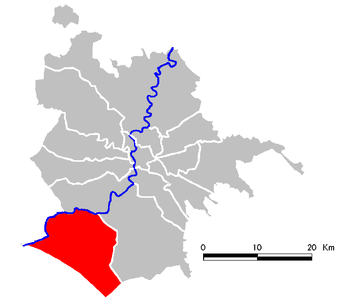 Municipio Roma X